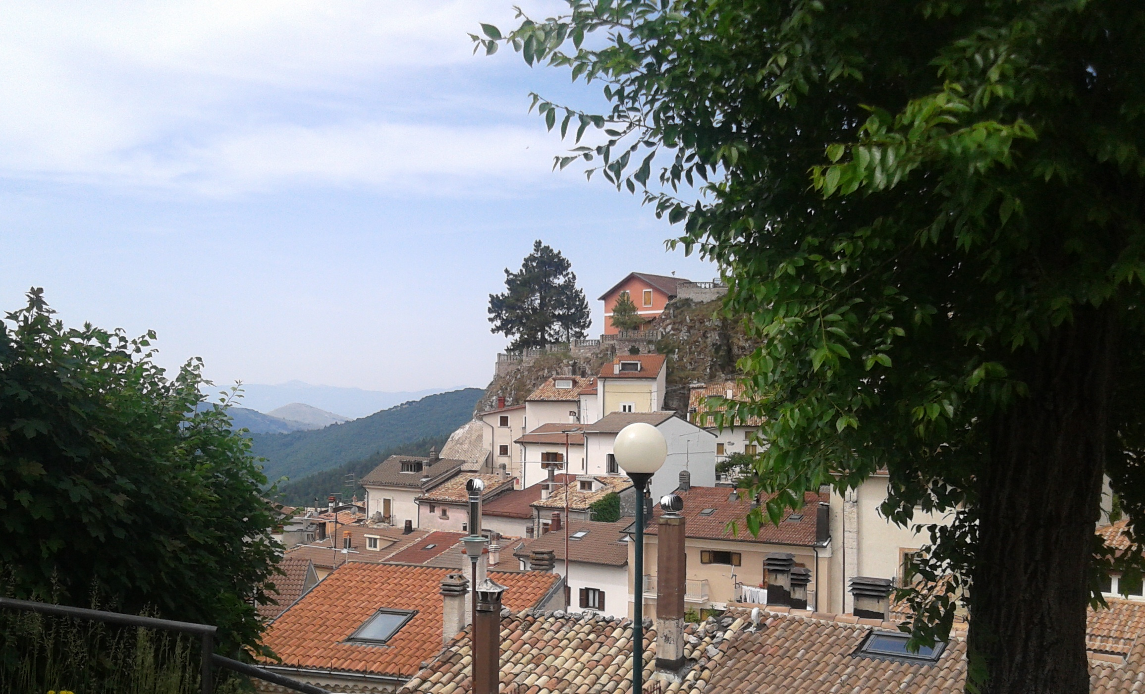 Scorcio fotografico di Ovindoli